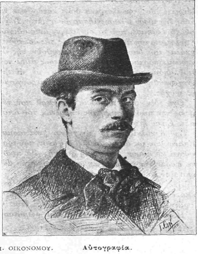 Griechischer Zeichner, 19. Jahrhundert